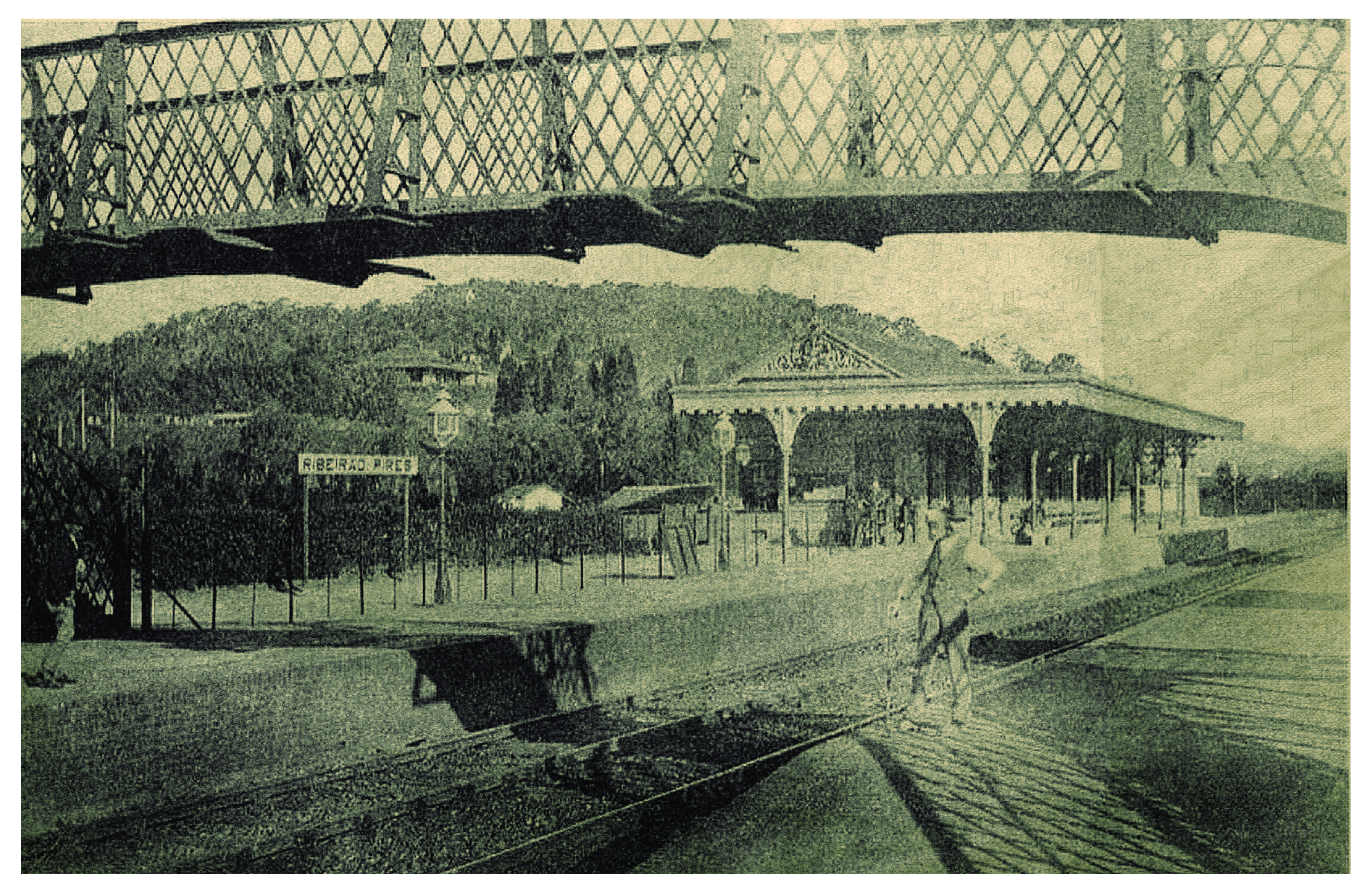 Vista da estação Ribeirão Pires em 1910.